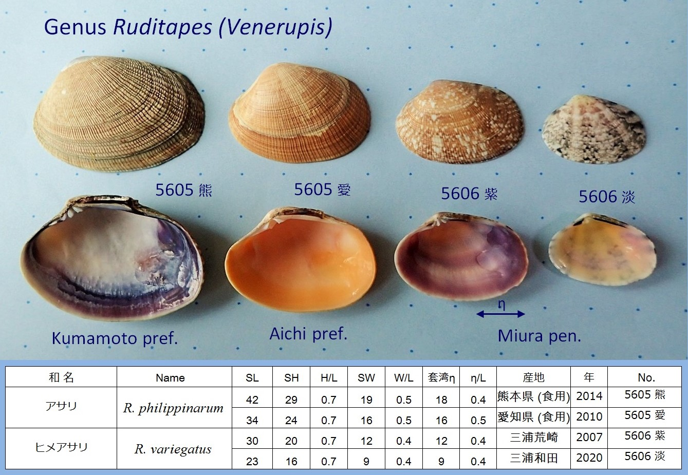 アサリ類で、内面が紫色やオレンジ色の貝殻。